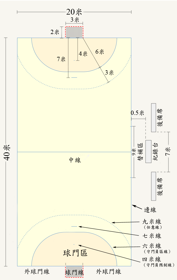 手球場地的說明(繁體中文版本)